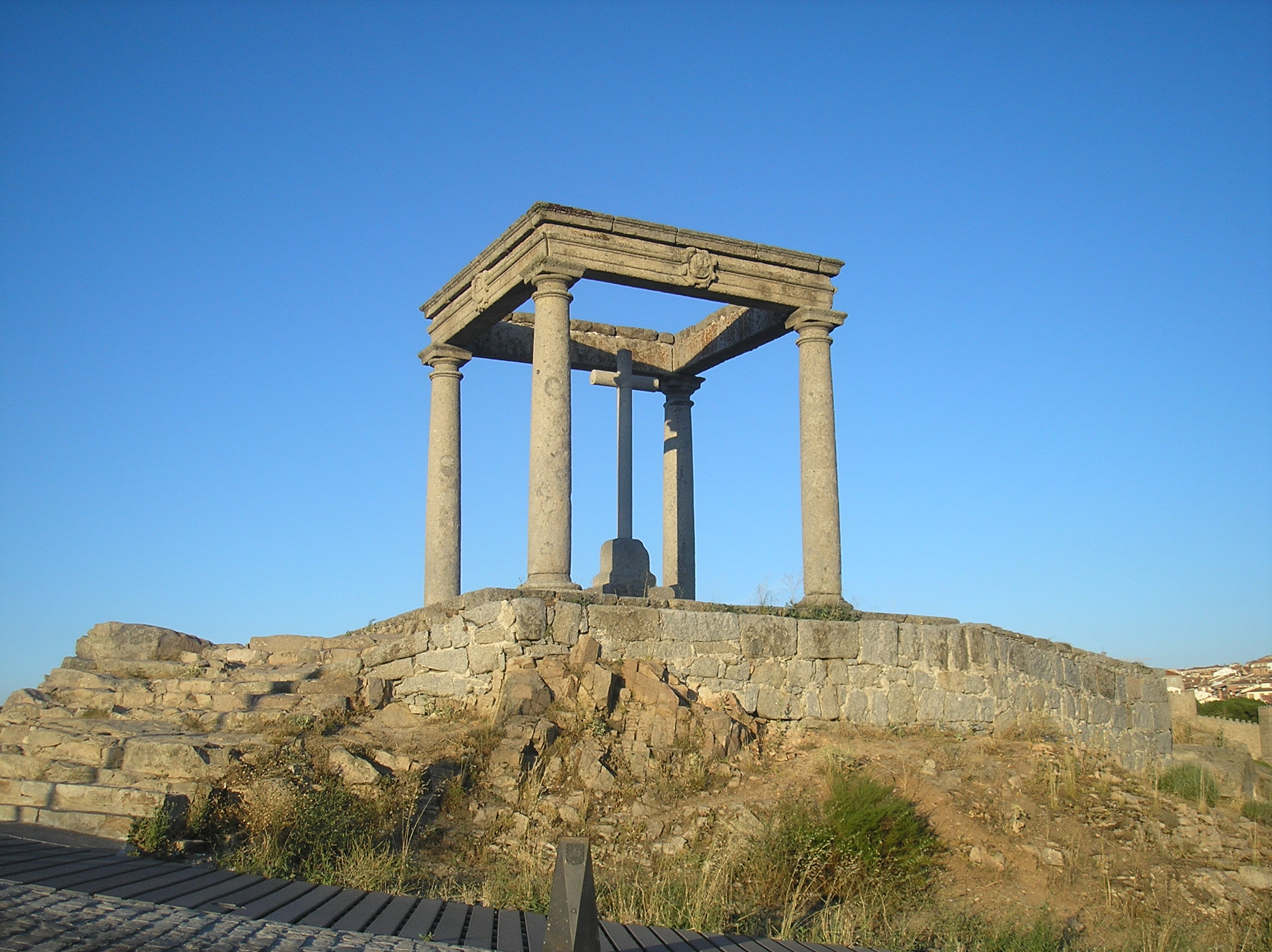 Los Cuatro Postes, Ávila, España